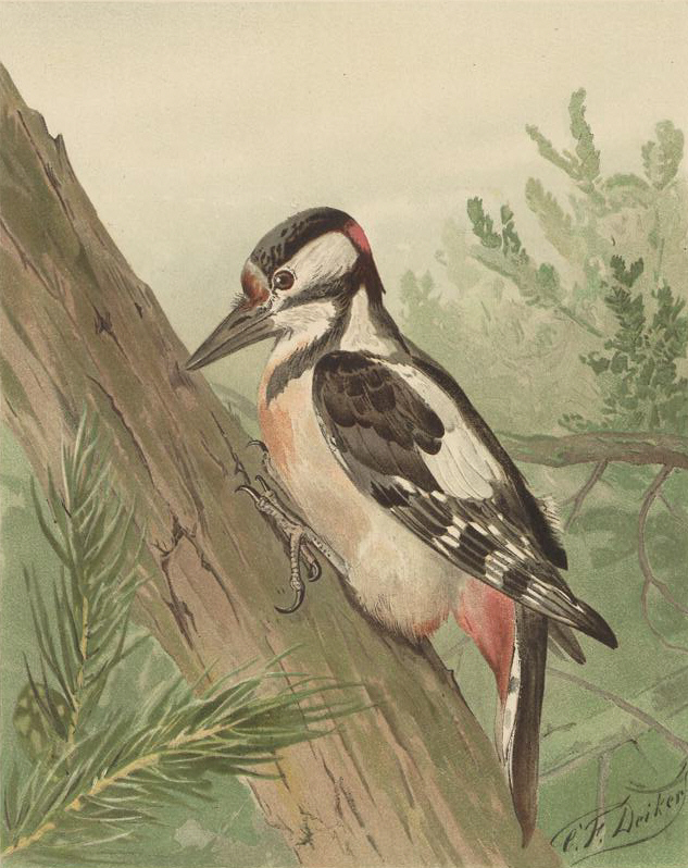 Chromolithographie aus der Serie „Jagdbare Thiere“ von Carl Friedrich Deiker Grosser Buntspecht. n. Orig.-Zeichn. v. Ad. Müller.